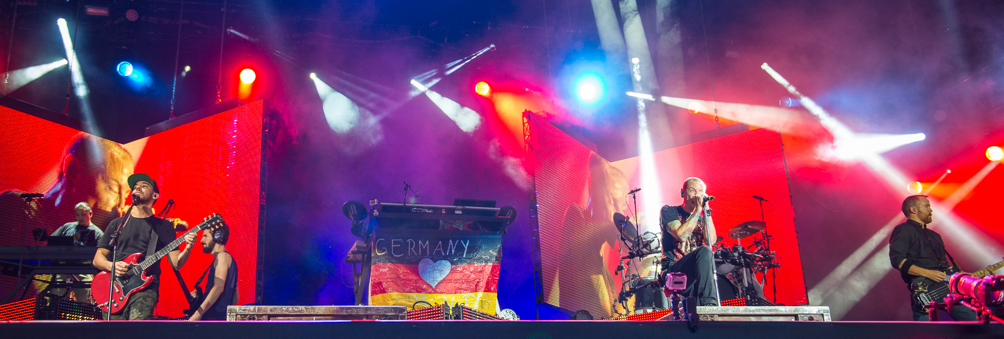 ARGO-Konzerte,Centerstage,Konzert,Linkin Park,Livekonzert,Livemusik,Musik,RiP,Rock im Park 2014